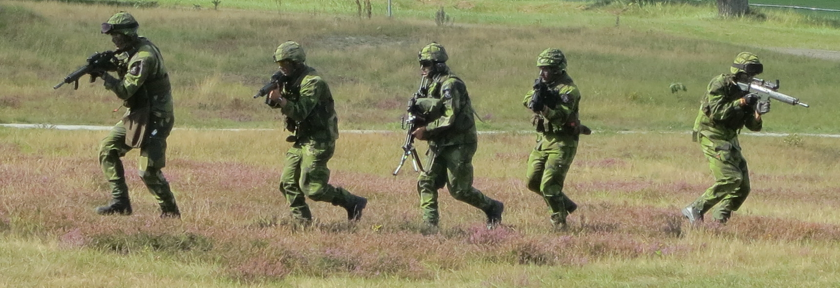 Svenska soldater vid Regementets Dag på P7 Revingehed